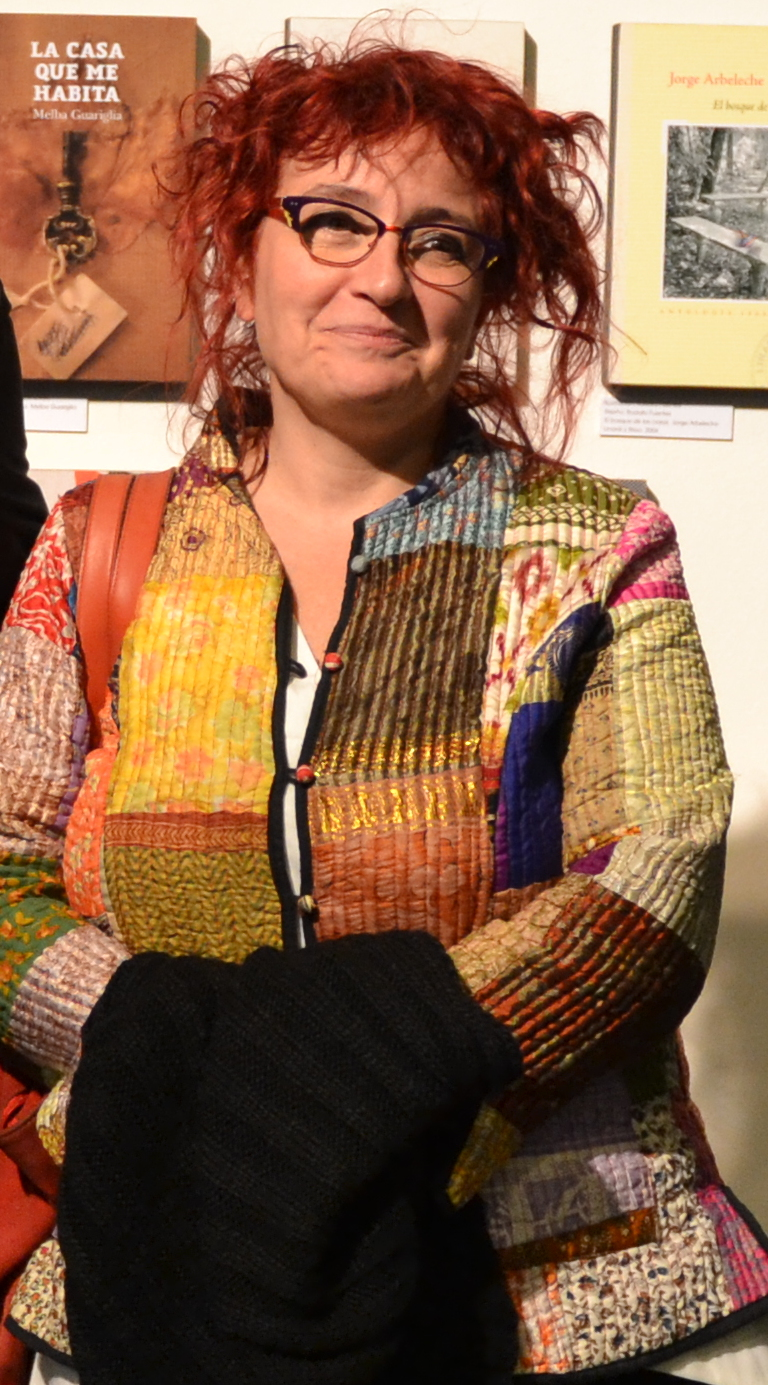 Filba 2016 Montevideo. Uruguay. Centro Cultural de España en Montevideo. Mariana Percovich, directora de cultura de la Intendencia de Montevideo.